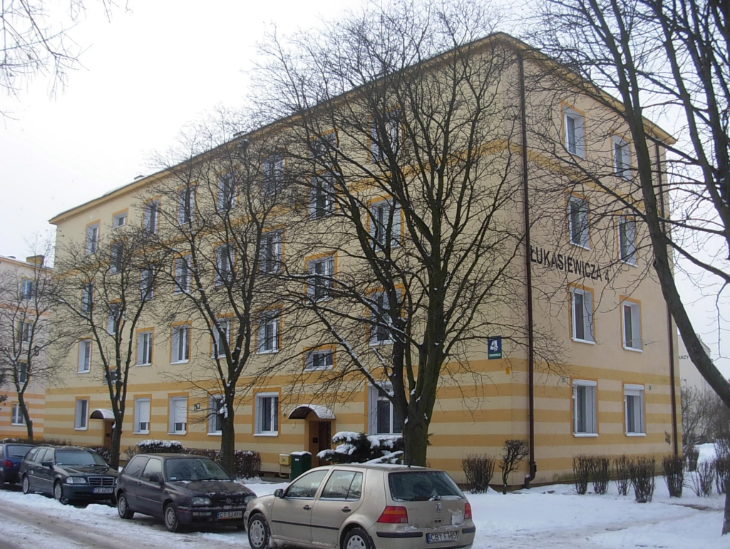 Zabudowa na osiedlu Kapuściska w Bydgoszczy